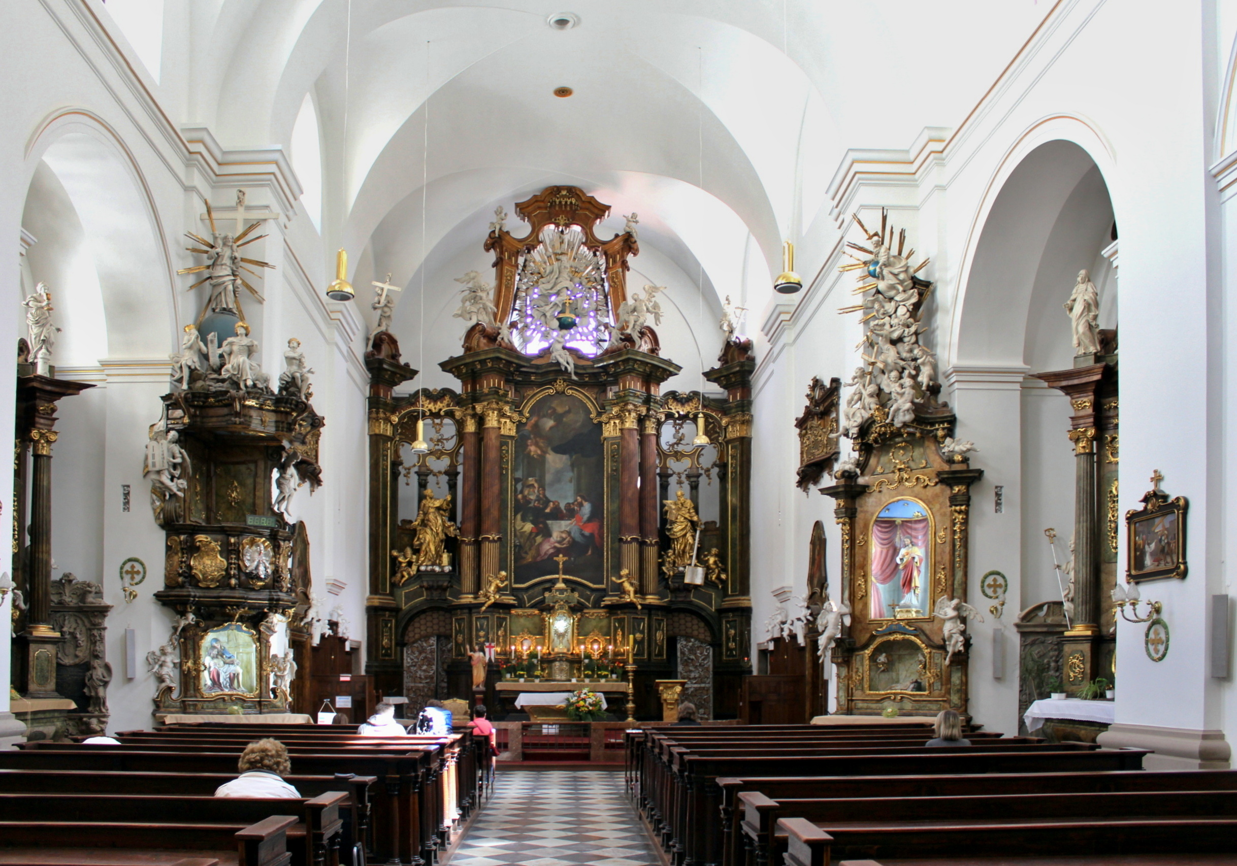 Brno, kostel sv. Marie Magdaleny